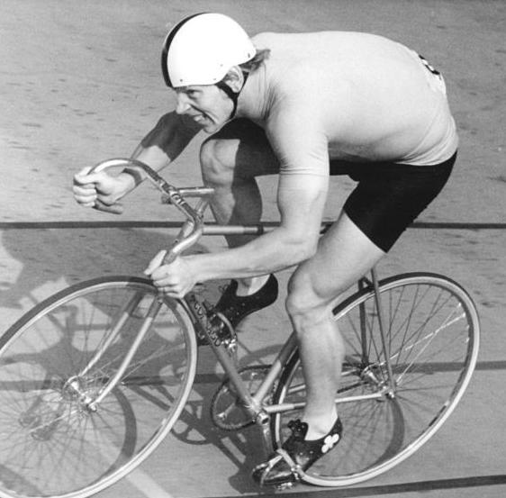 Lothar Thoms ADN-ZB Gahlbeck 1.7.78-str-Leipzig: DDR-Meisterschaften im Bahnradsport - Erster Titelträger wurde am 30.6. der Cottbusser Weltmeister Lothar Thoms im 1.000 m Zeitfahren. Mit 1:05,85 min stellte er dabei einen neuen Bahnrekord für die Leipziger Alfred-Rosch-Kampfbahn auf.